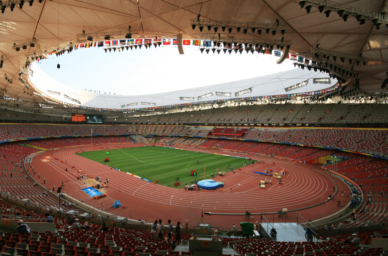 Beijing National Stadium Interior creado por miguel alejandro rodriguez contreras